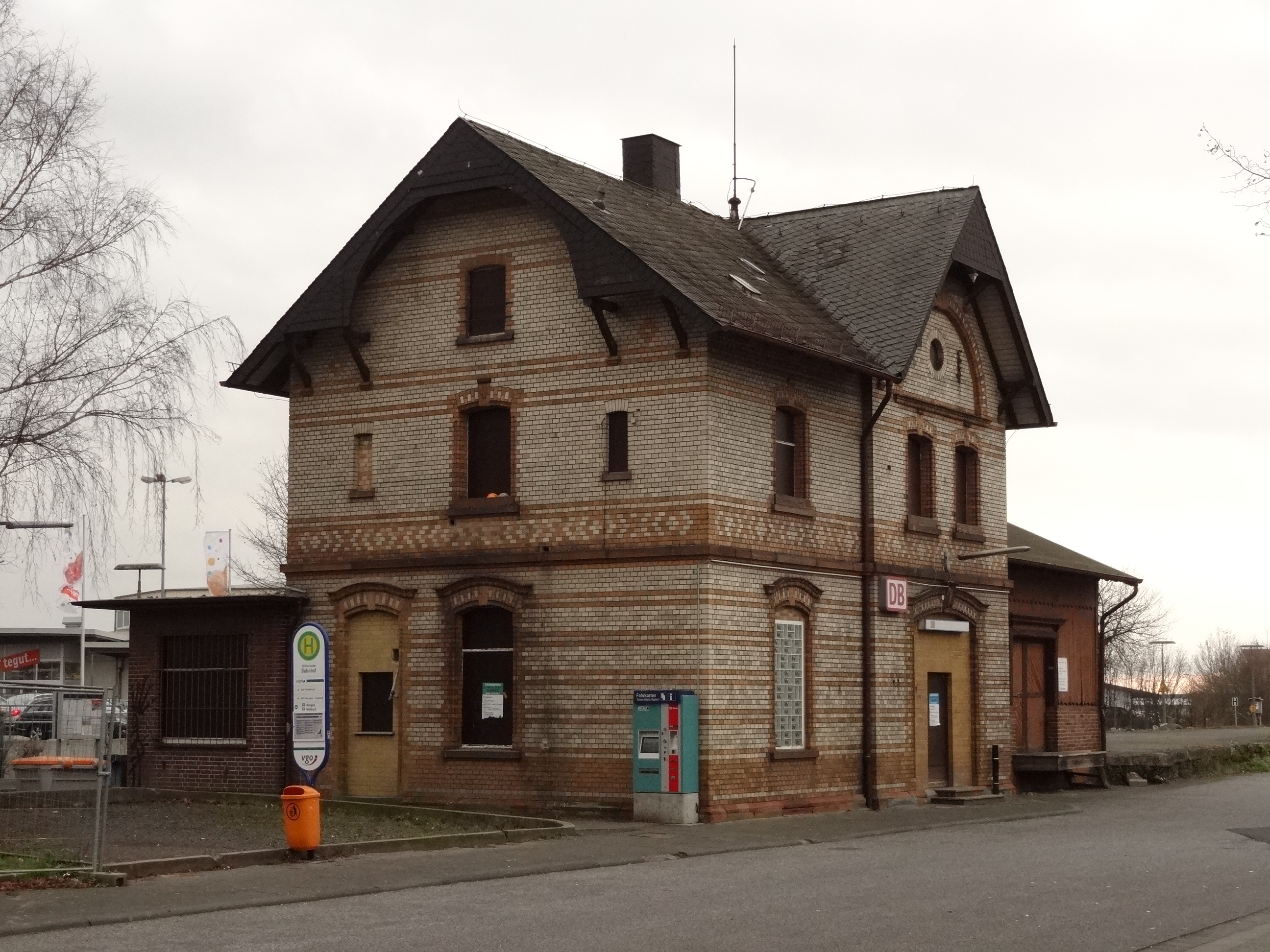 Bahnhof Wölfersheim-Södel